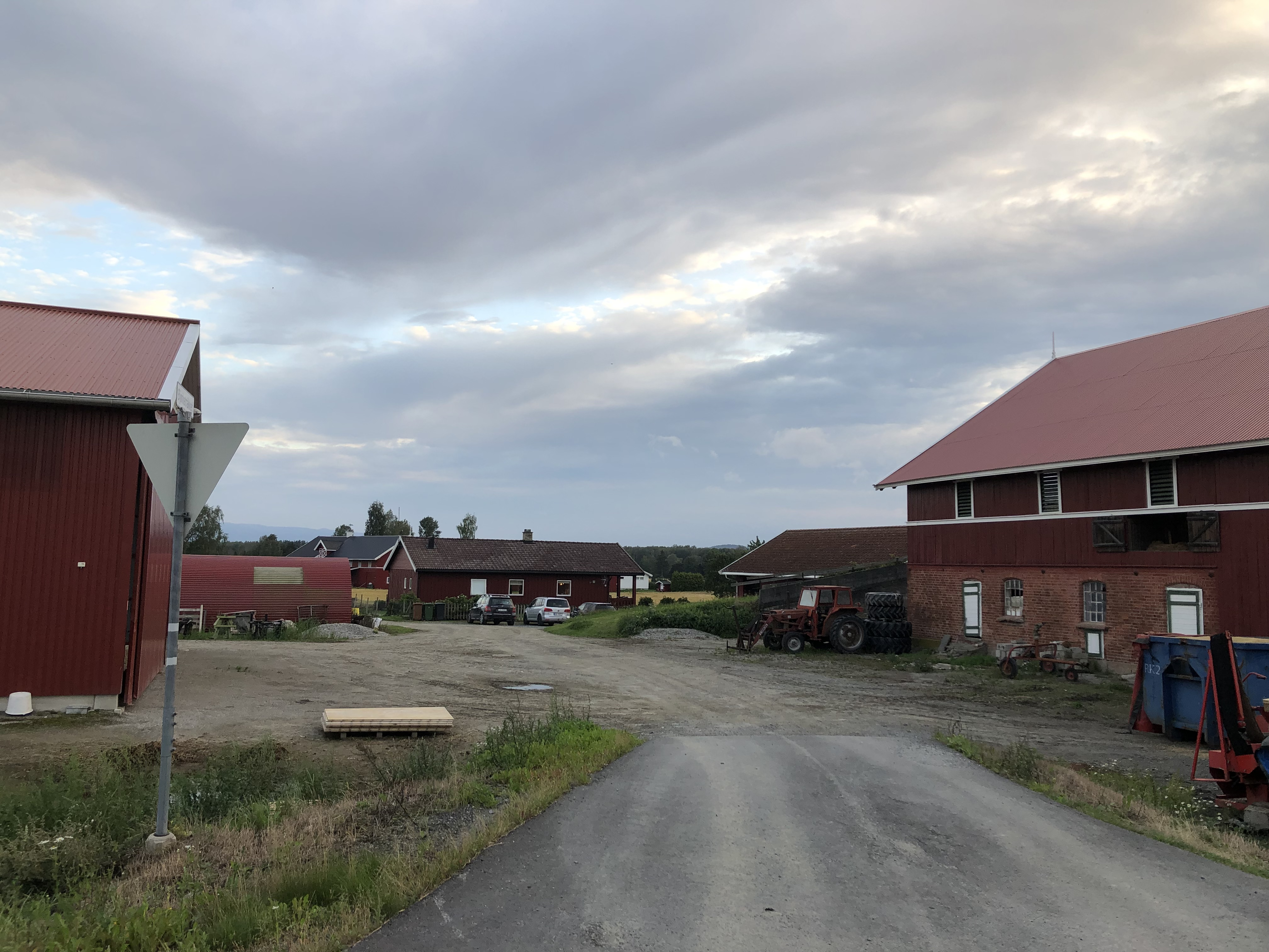 Bjørketråkket på Ask Ringerike, veien går gjennom Bjørke gård søndre.